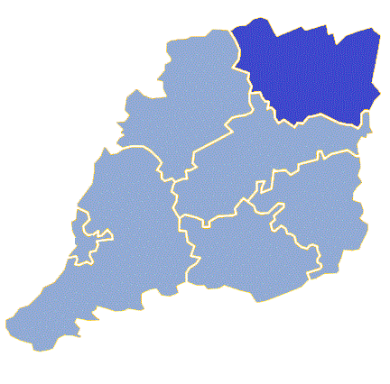 Powiat krośnieński (województwo lubuskie) - Gmina Bytnica